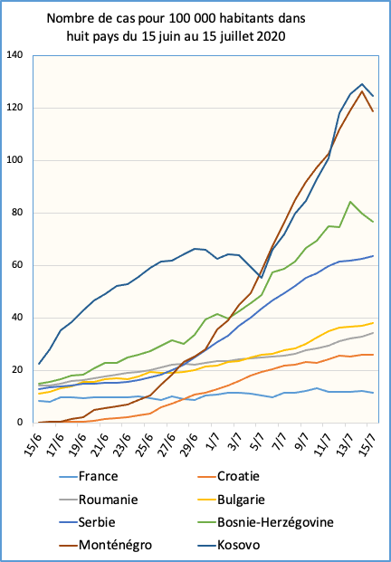 Graphique du nombre de cas de Covid-19 dans huit pays d'Europe entre le 15 juin et le 15 juillet 2020 Source ECDC